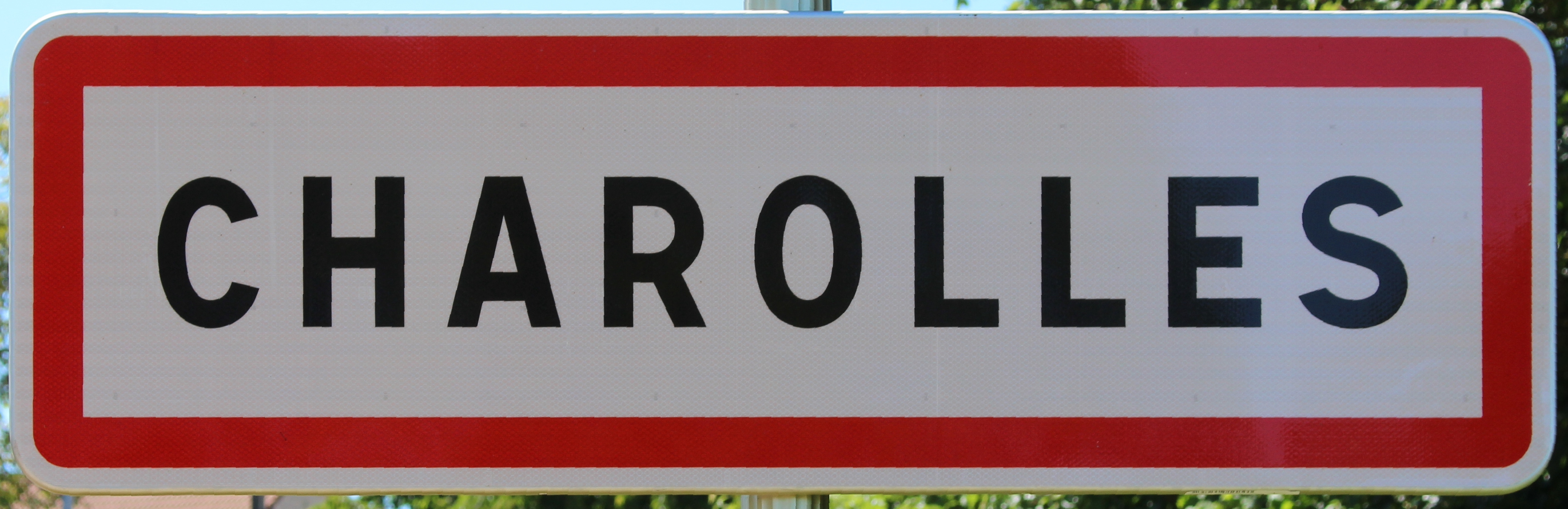 Panneau d'entrée dans Charolles.